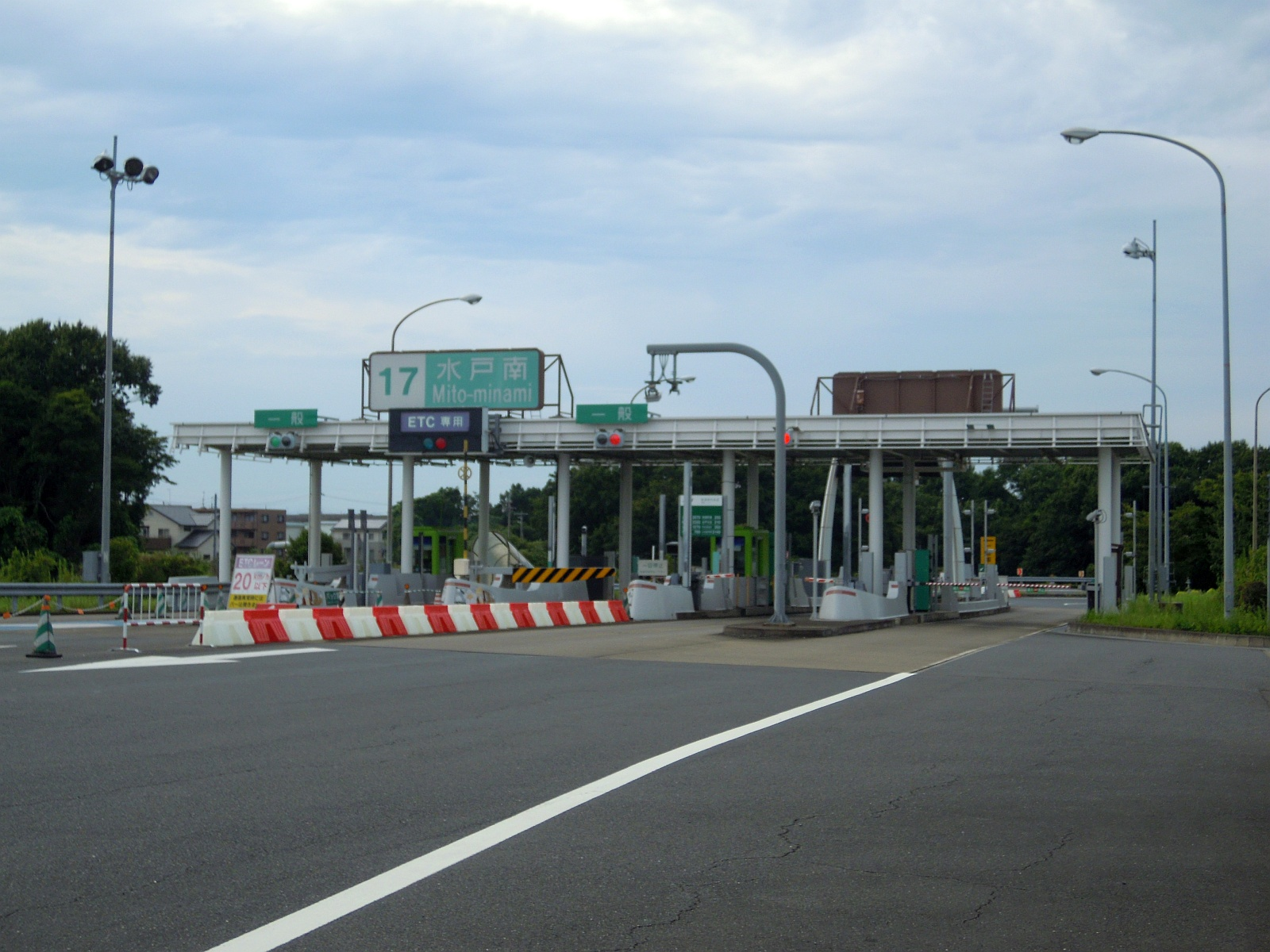 茨城県水戸市にある北関東自動車道と東水戸道路の水戸南インターチェンジ料金所を本線側から。